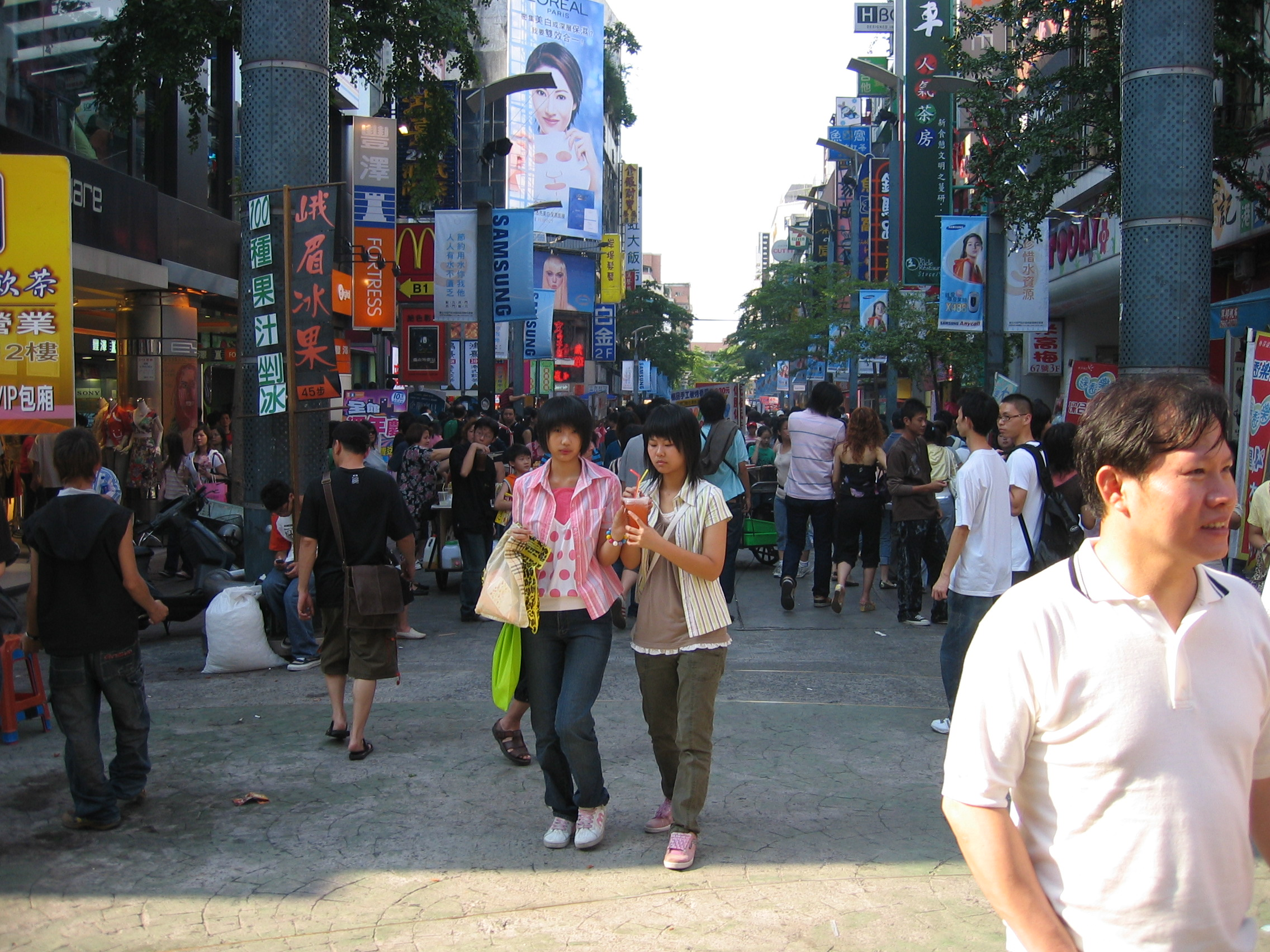 台北市万華区西門町の漢中街。